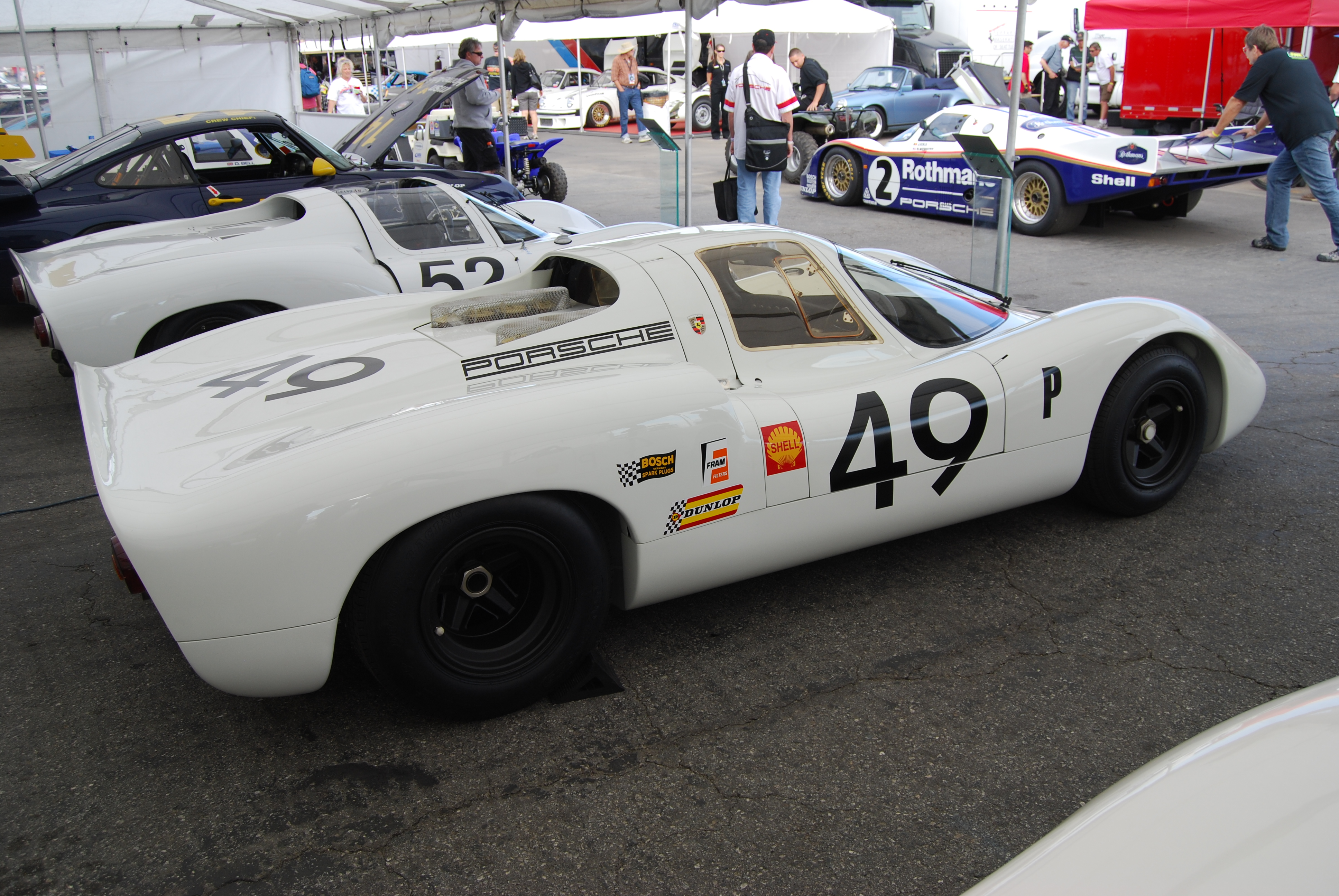 8d10_DSC_0448